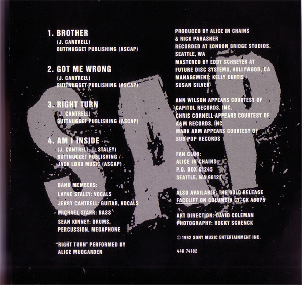 задняя обложка альбома Sap Alice in Chains